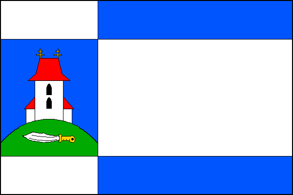 Rozhodnutím č. 17 předsedy Poslanecké sněmovny Parlamentu České republiky ze dne 18. března byl obci udělen znak a prapor. Předseda Poslanecké sněmovny Lubomír Zaorálek dne 6. června 2003 rozhodnutí o udělení znaku a praporu slavnostně předal obci.